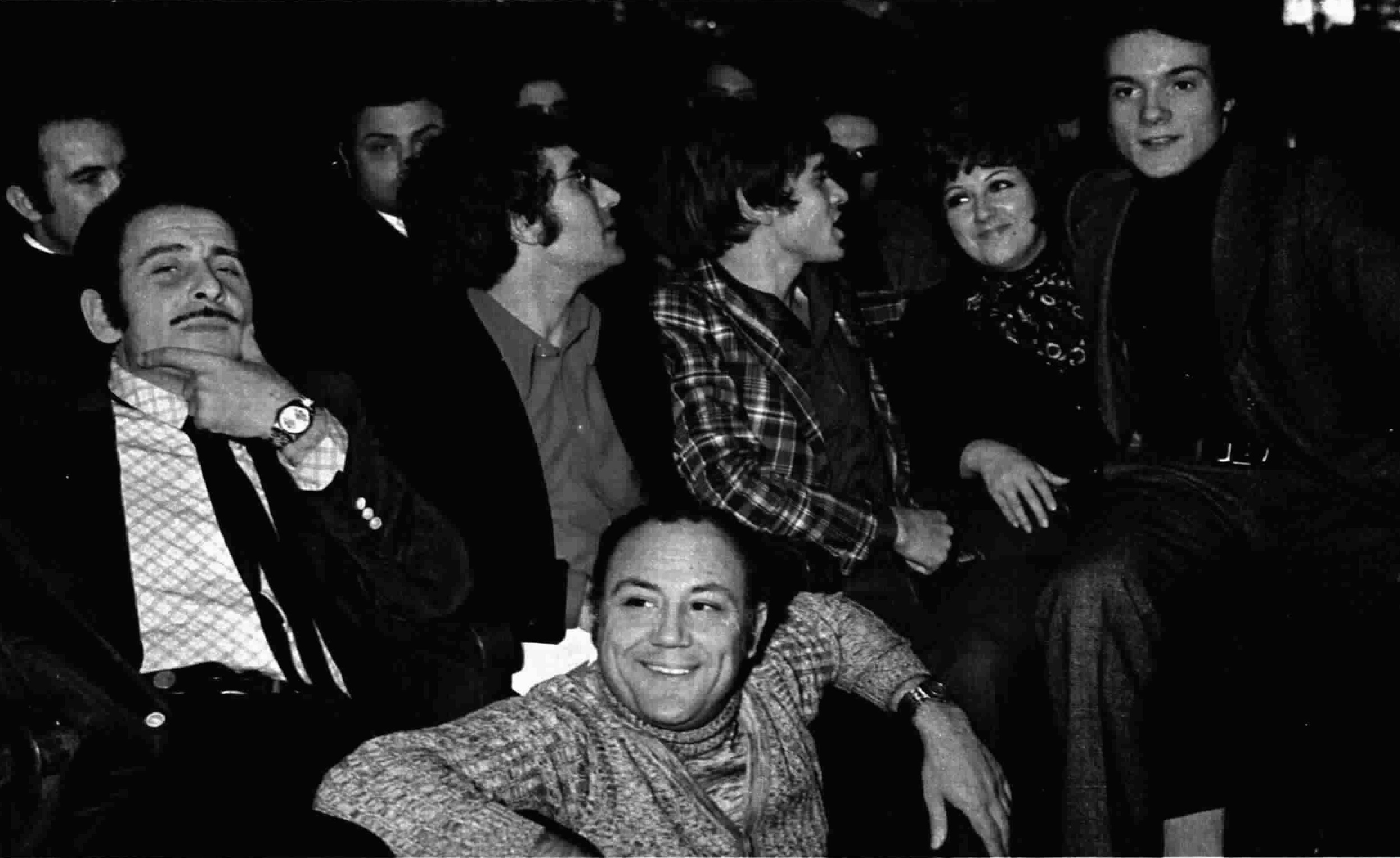 Singers Domenico Modugno, Al Bano, Gianni Morandi, Orietta Berti, Massimo Ranieri and Claudio Villa, backstage of finals of Canzonissima, January 1970